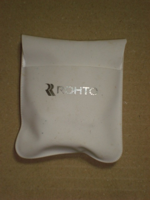 1997年から2003年にかけて発売されたロート製薬製の目薬の一部に付属する目薬ケース。ロート製薬の2代目ロゴマーク入り。